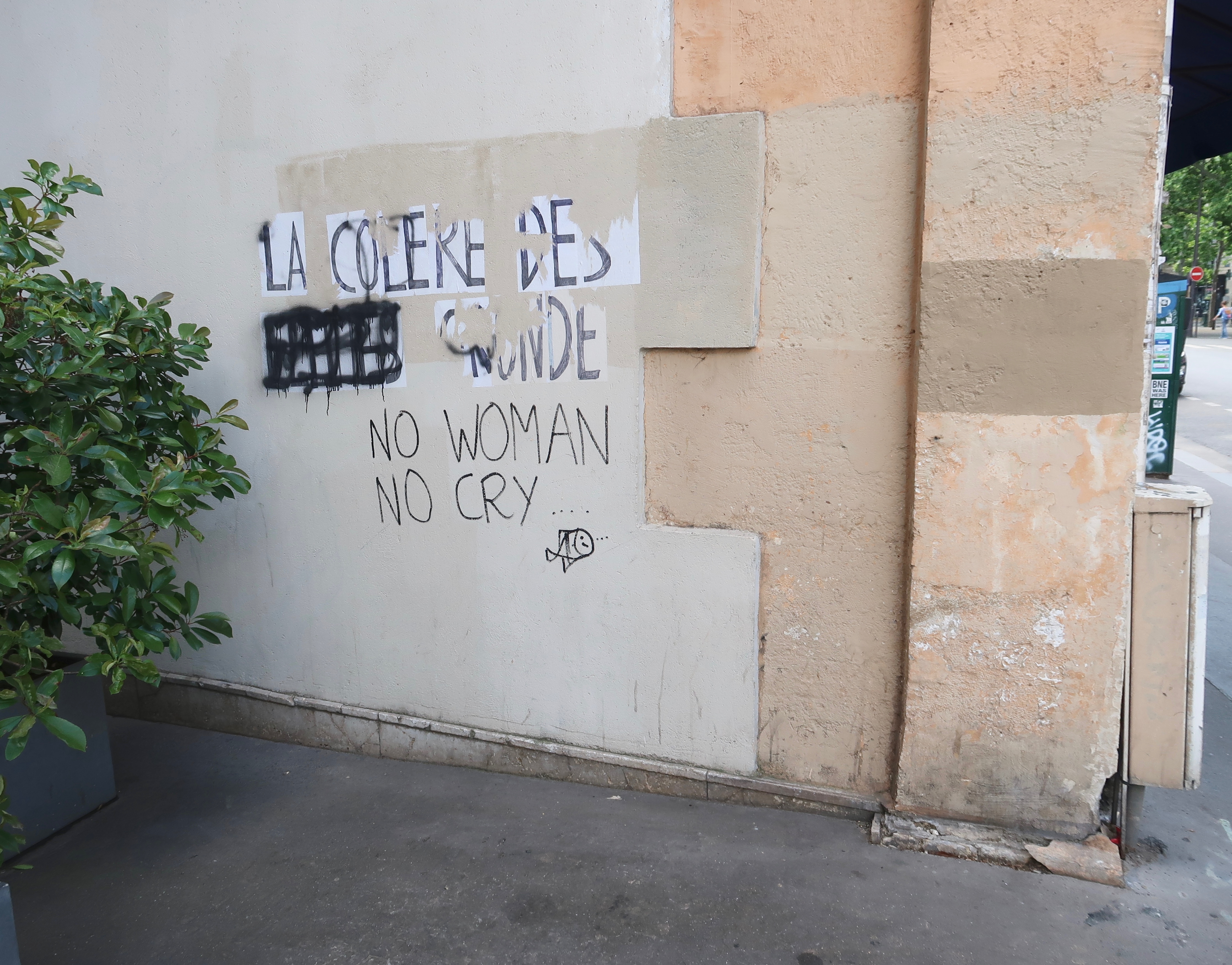 Collage et graffiti féministe, rue d'Auteuil (Paris, 16e). Texte : "La colère des ?" et "No woman, no cry".